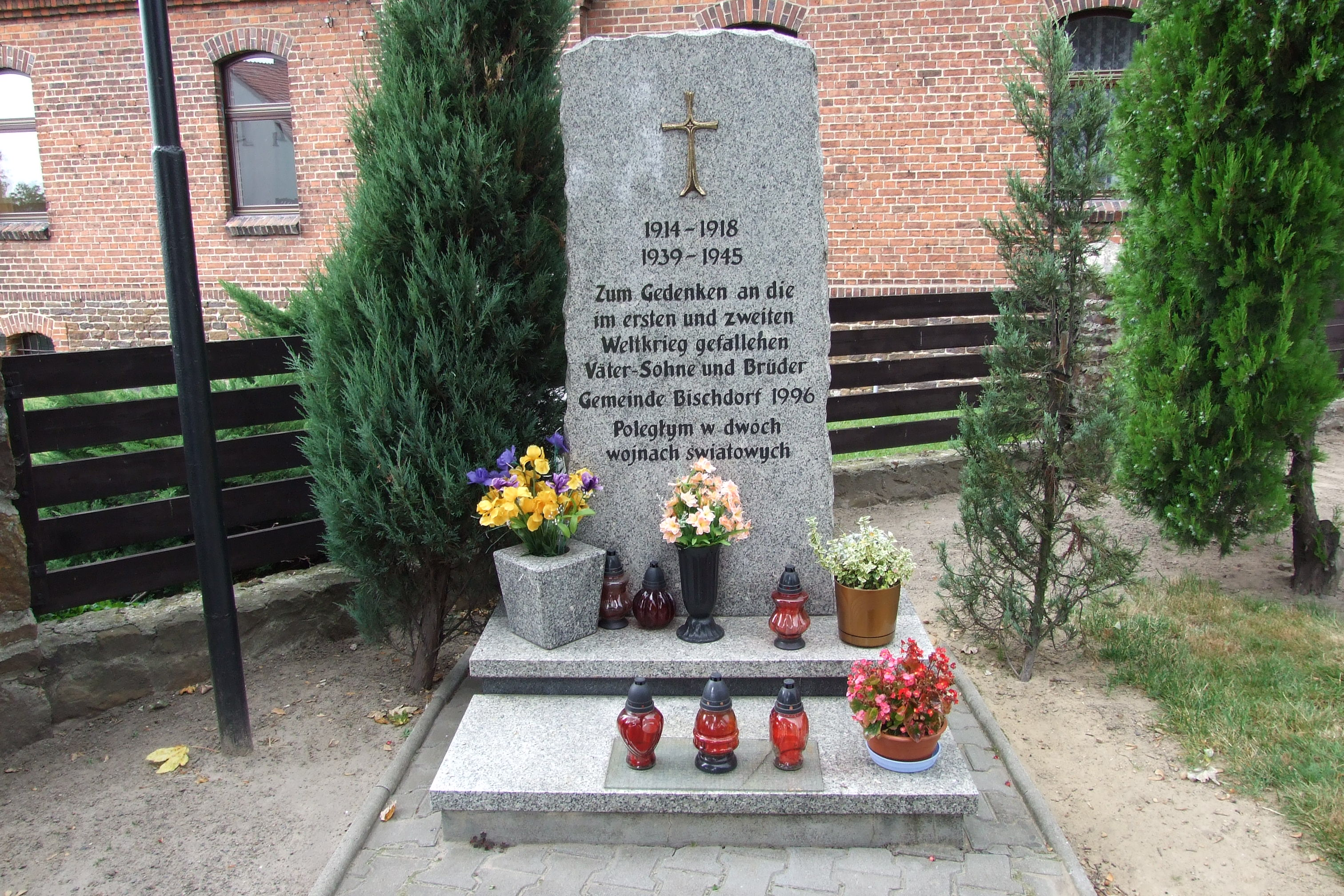 Pomnik ofiar dwóch wojen światowych w Biskupicach (powiat oleski)